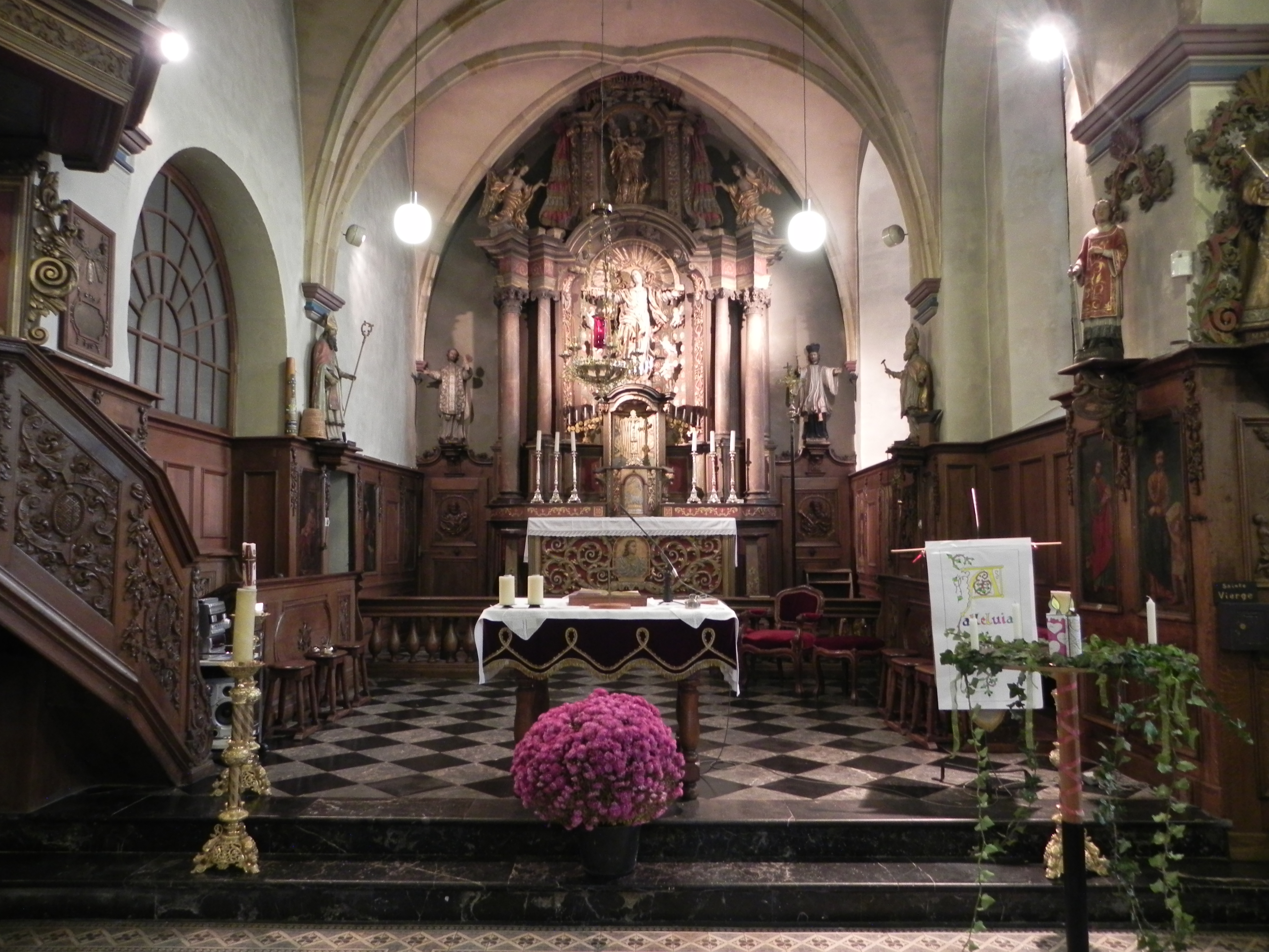 Choeur de l'église de Tintigny